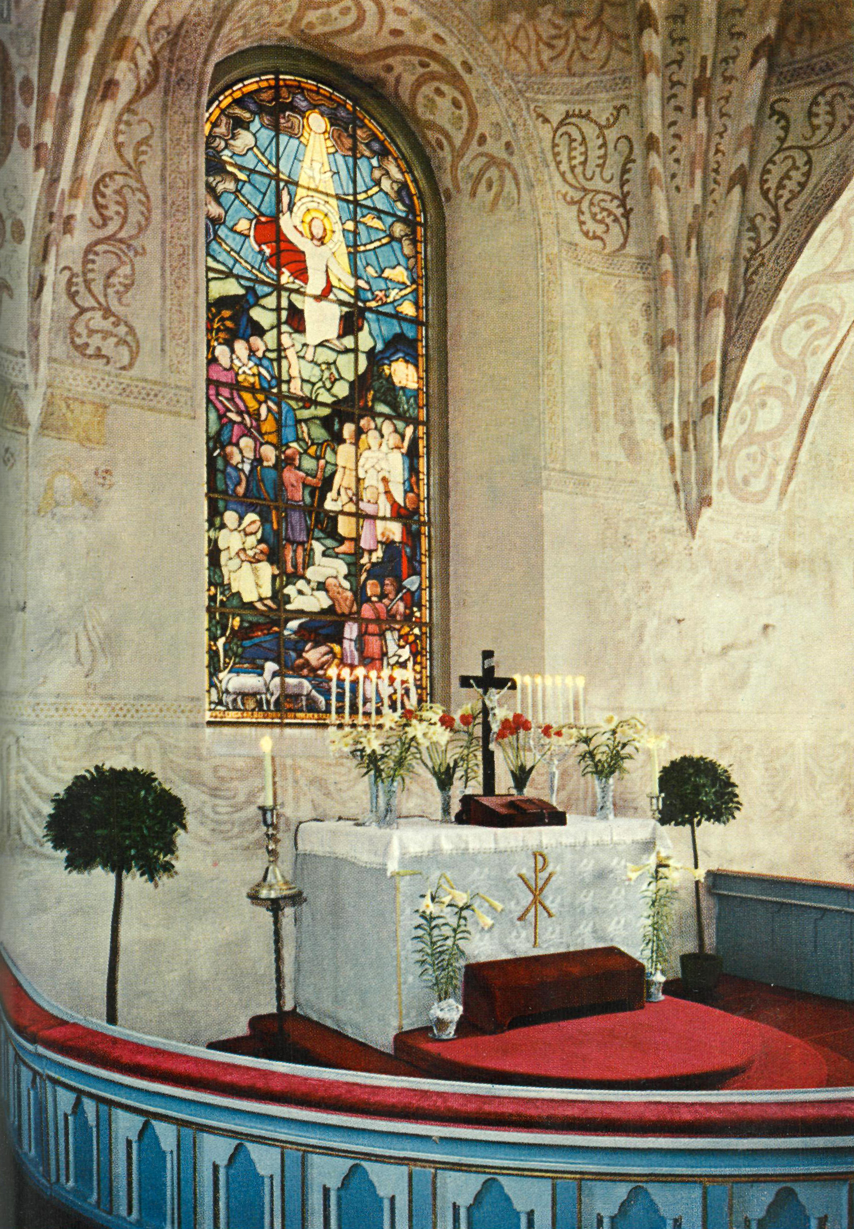 Espoon kirkon kuori ja alttari vuonna 1958, lasimaalaukset Gunnar Forsström. Alttari siirrettiin 1982 kahden pylvään väliin keskemmälle kirkkosalia.